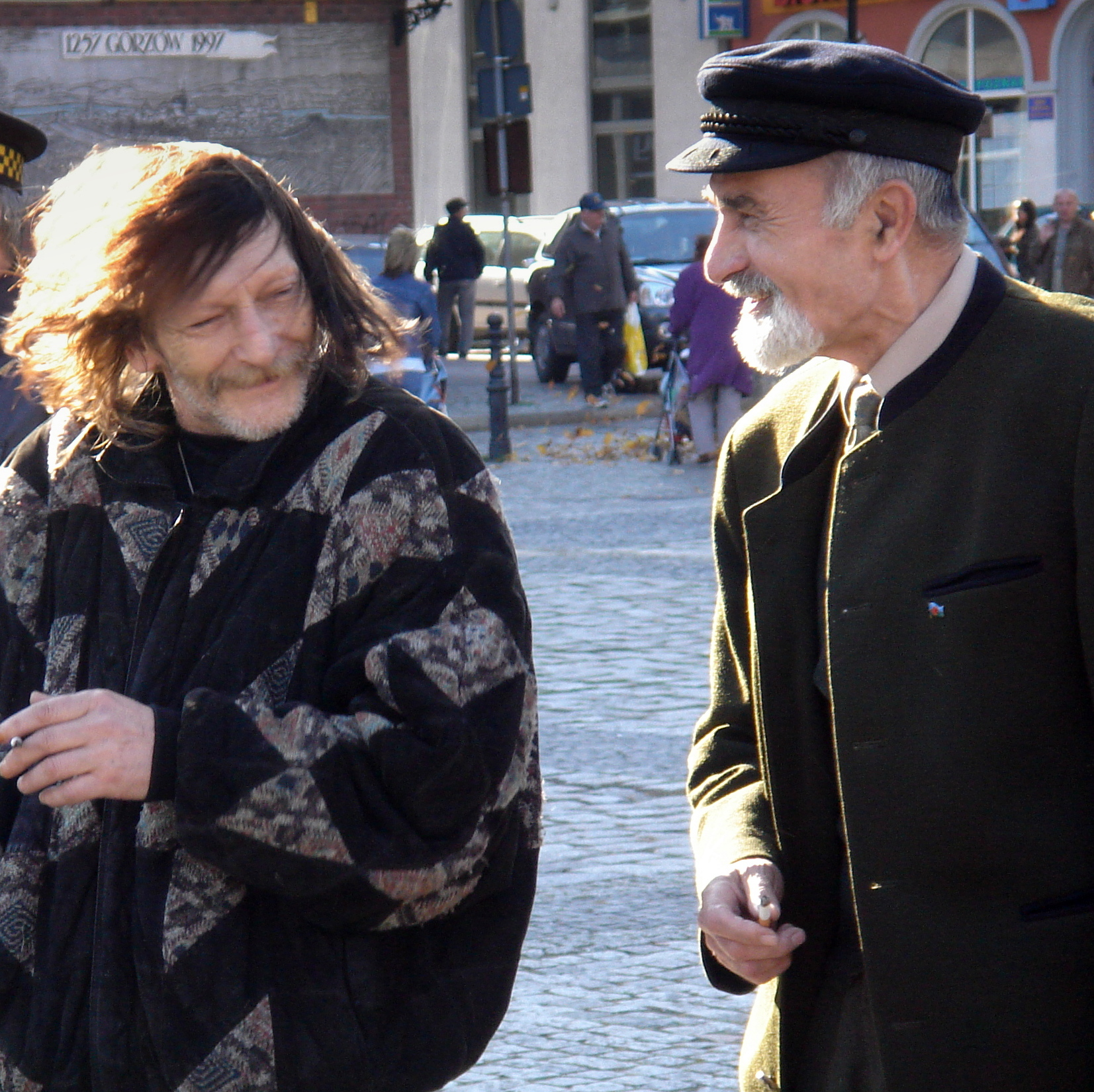 Nieoczekiwane spotkanie Kazimierza Furmana z Karolem Parno Gierlińskim na Starym Rynku w Gorzowie Wlkp.